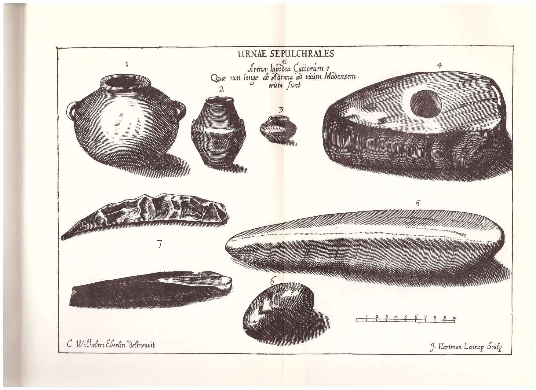 Archäologische Funde derGrabung Landgraf Karl I. auf der Mader Heide 1708